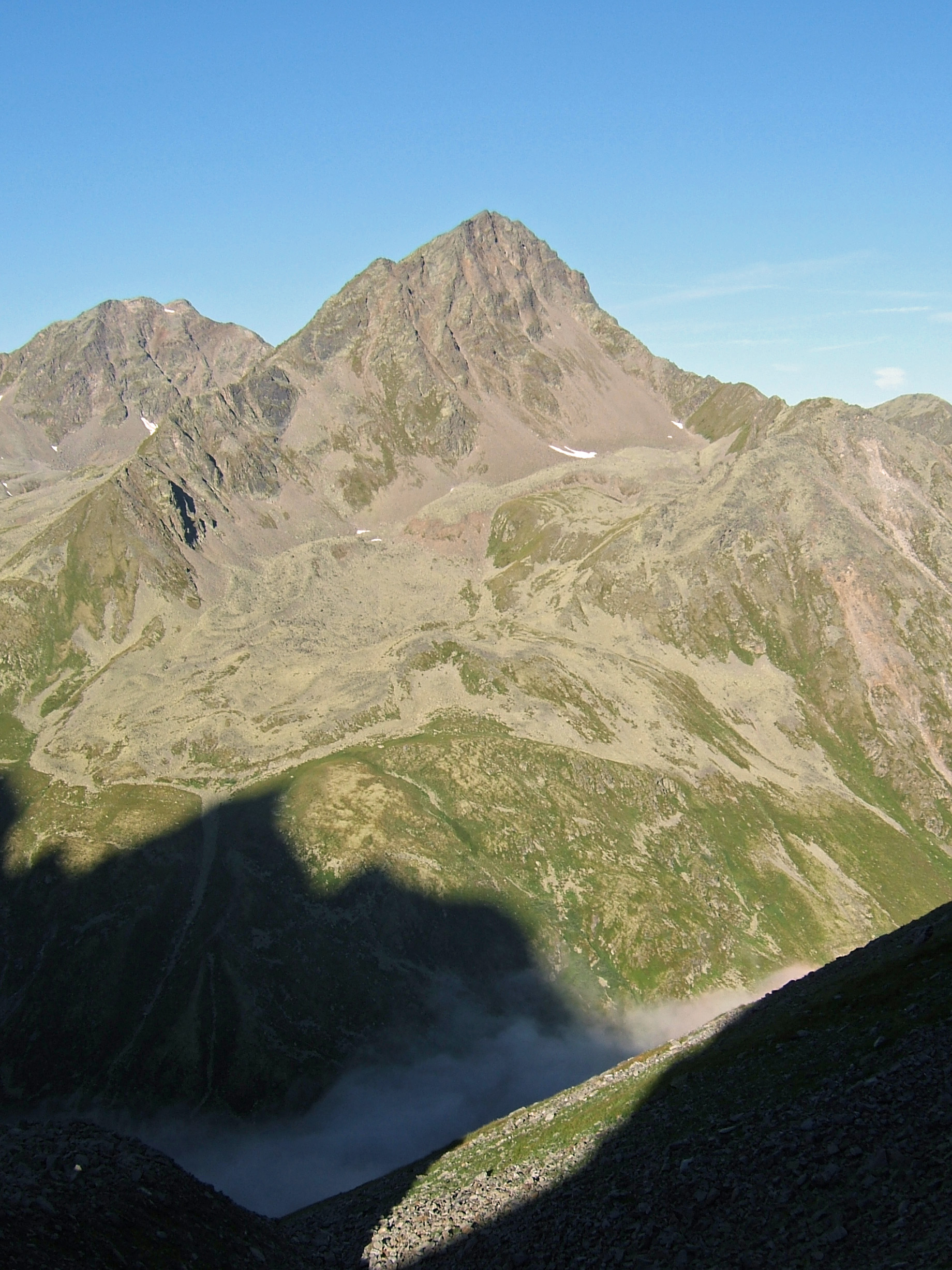 Wildnörderer von Südosten, vom Hüttekar